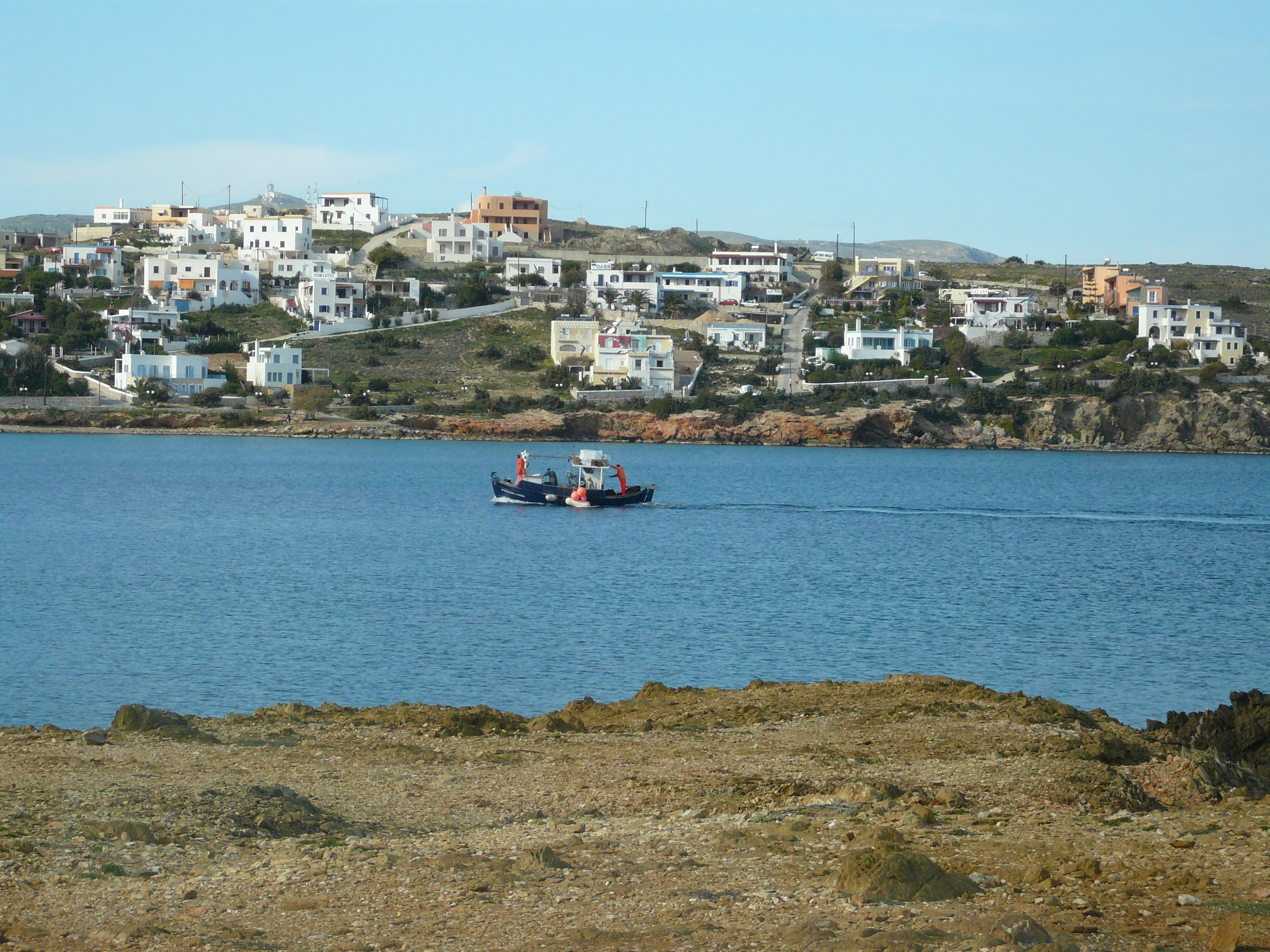 Τράτα παραλία Αζολίμνου